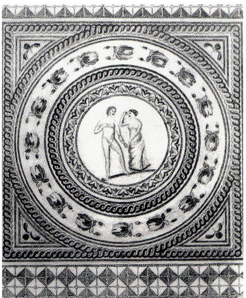 Il s'agit d'une aquarelle du XIXème siècle d'une mosaïque romaine du site archéologique de Saint Quentin.